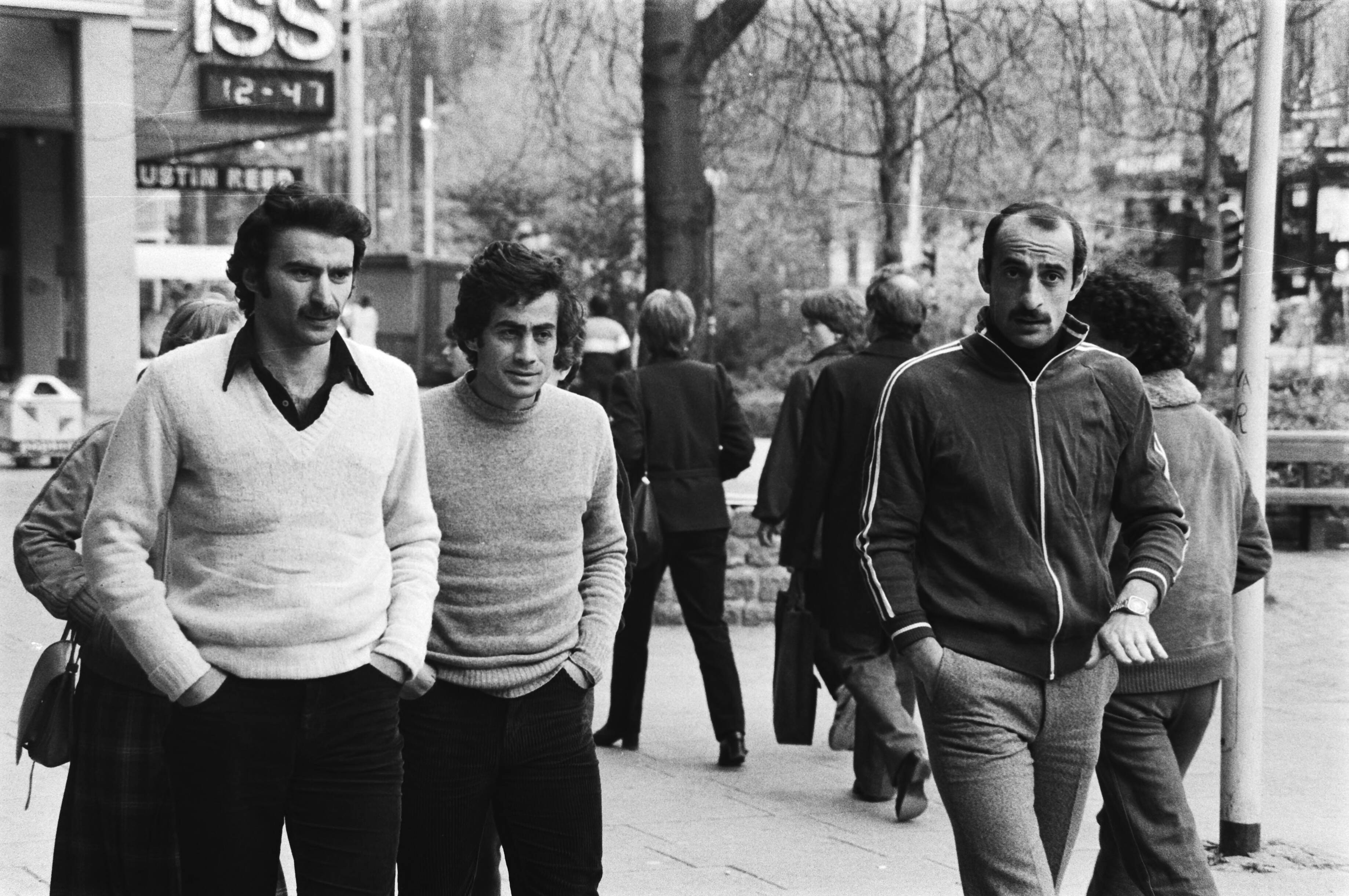 Morgen speelt Feyenoord tegen Dynamo Tiflis om de Europacup-II, de top van Dynamo Tiflis v.l.n.r. Chivadze, Gutzaev en Kipiani